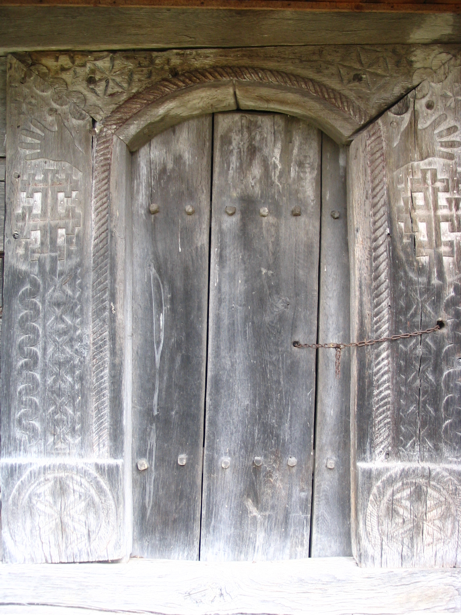 Biserica de lemn din Hida. Portalul intrării.